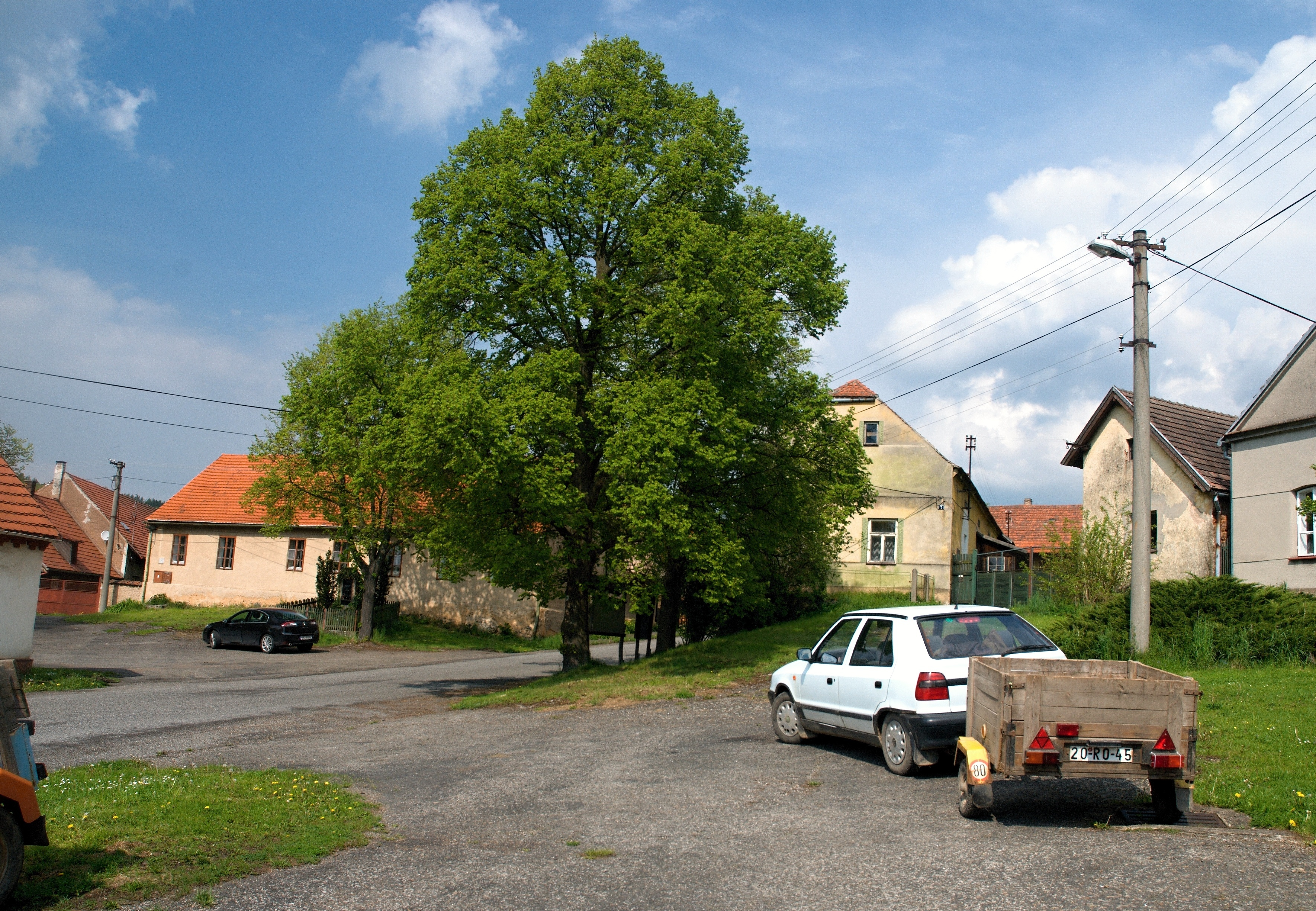 Náves